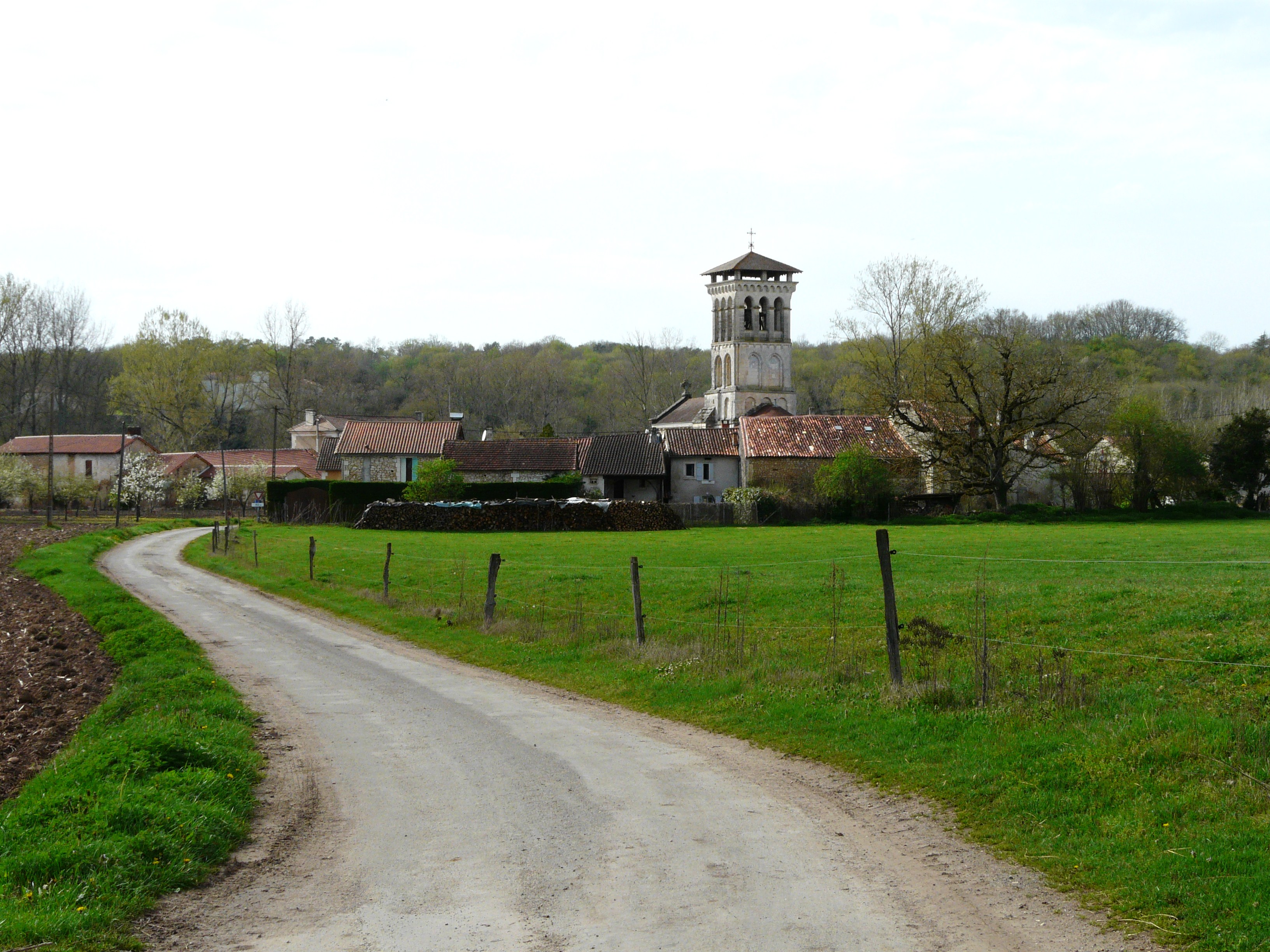 Le village de Creyssac vu depuis l'est-sud-est, Dordogne, France.